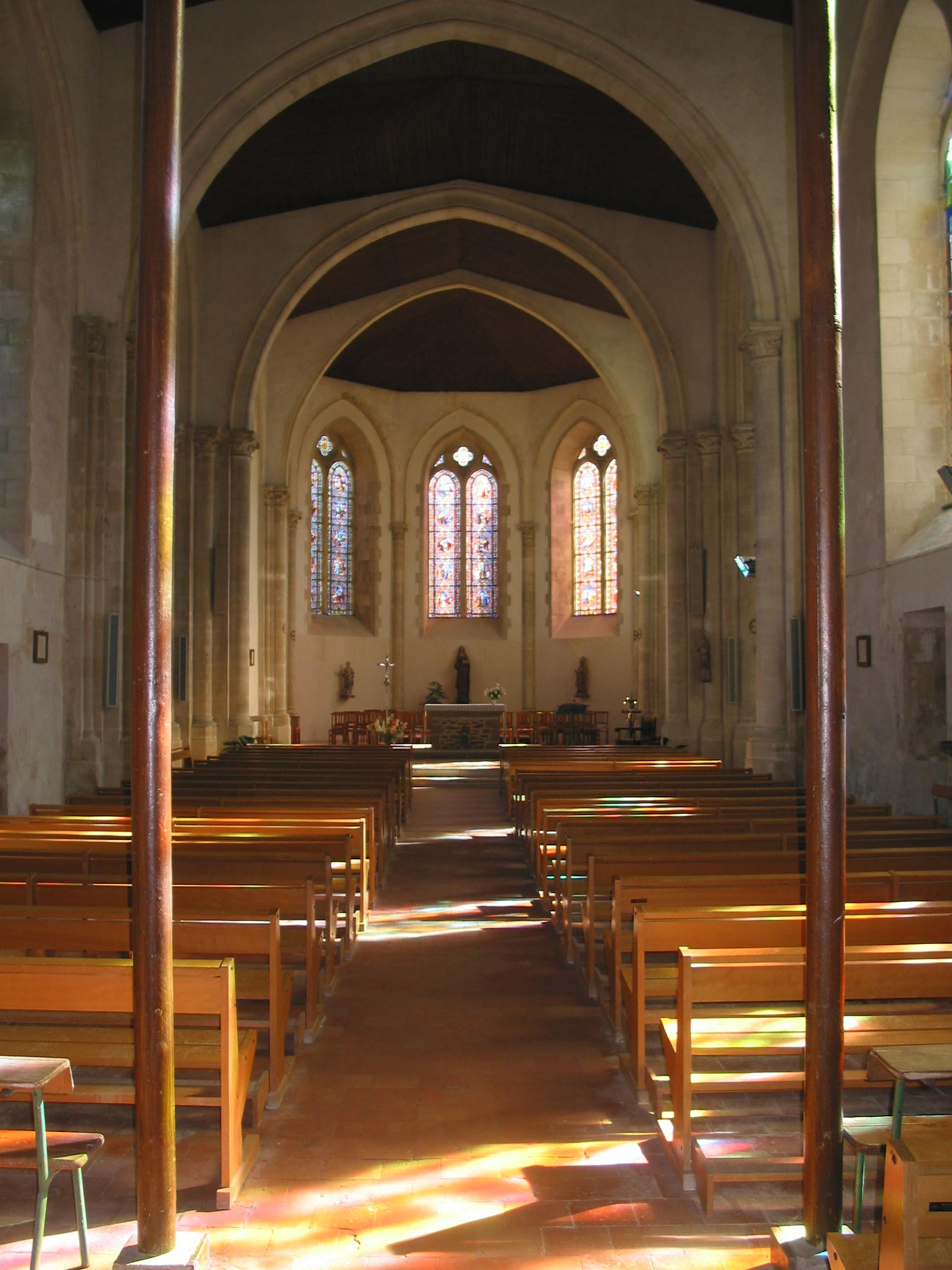 Eglise de Sainte-Suzanne en Mayenne